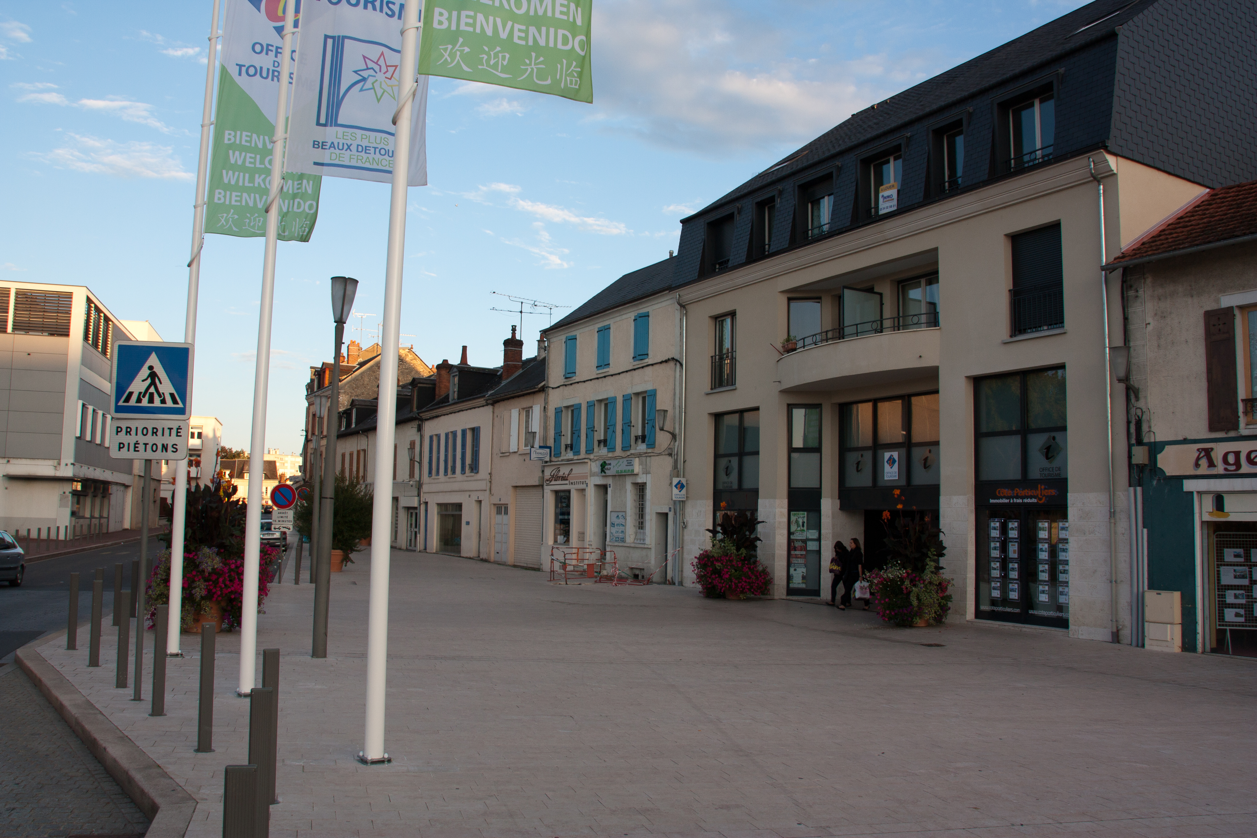 Office de tourisme de Montargis / Loiret - France